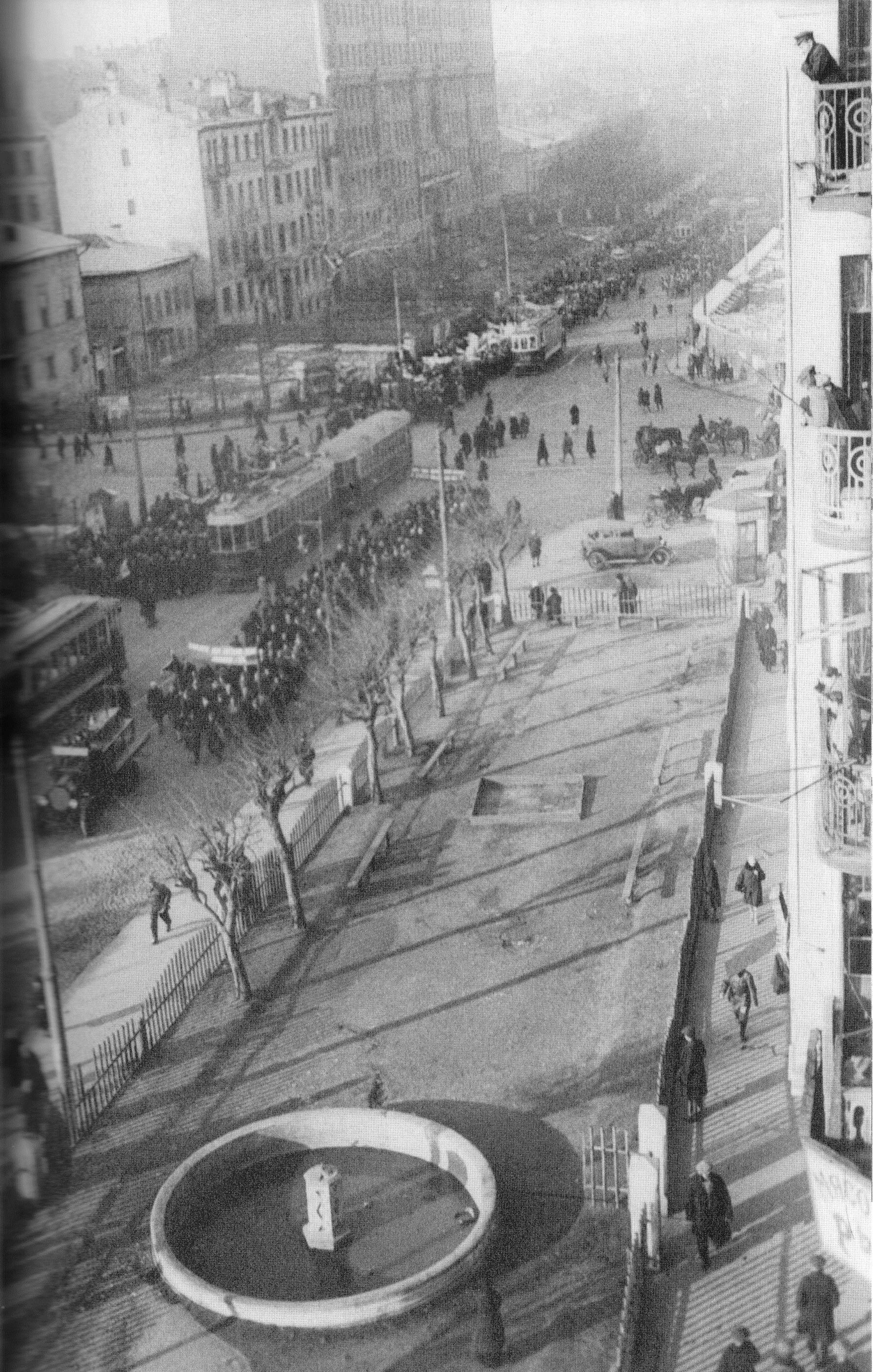 Праздничный день в Москве. 1929 год. На фото, снятом с дома Афремова в северо-западном направлении - Садово-Спасская улица и угол Мясницкой. Из всех домов по левой стороне сохранился самый крупный - дом общества "Великан" (Садово-Спасская 18с1. Соседний дом 20 перестроен по образцу дома "Великан" уже после войны). Балкончики с ковкой на доме Афремова давно утрачены.